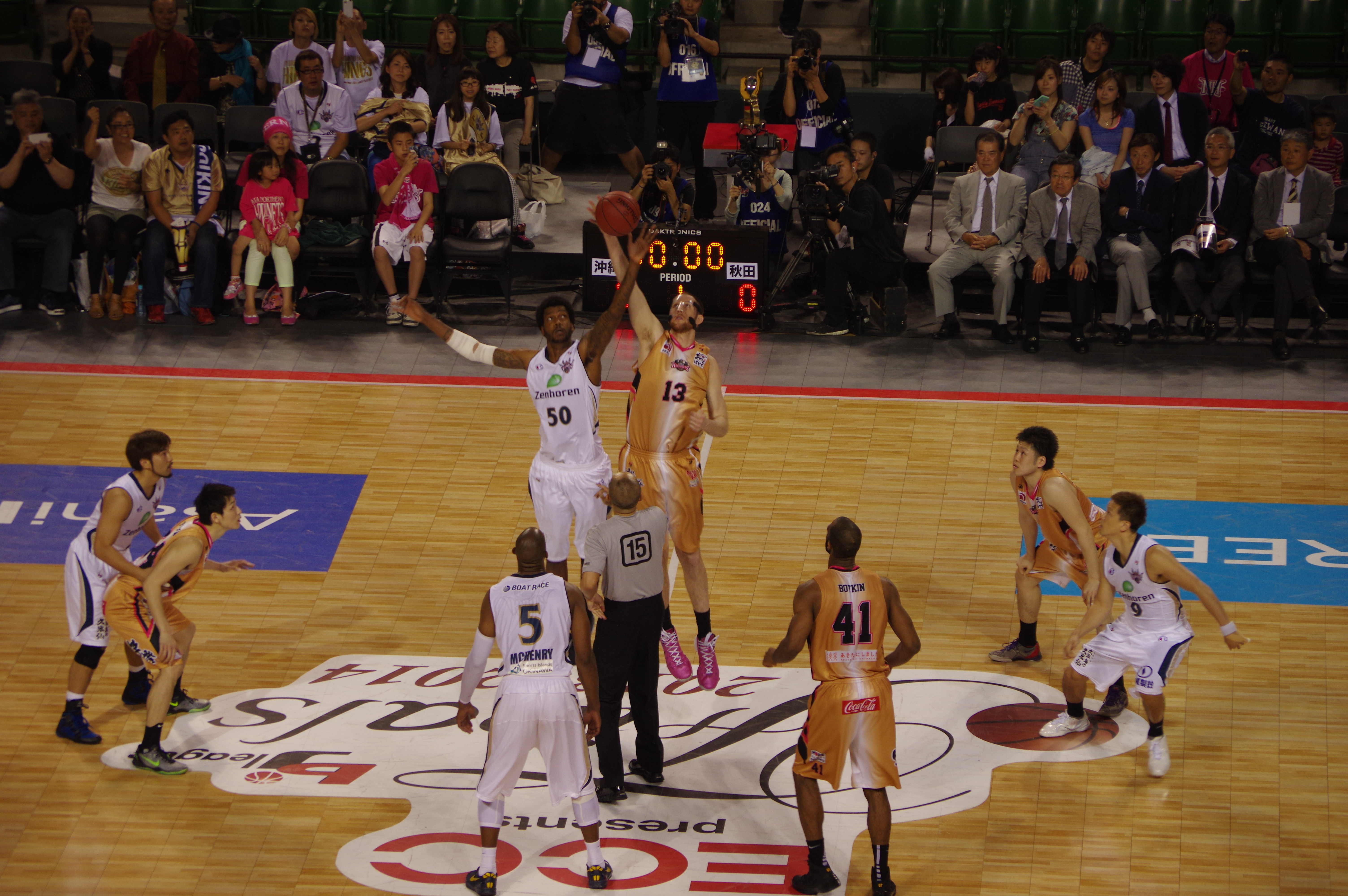 ｂｊリーグ 2013-2014シーズン プレイオフ ファイナルズ_023